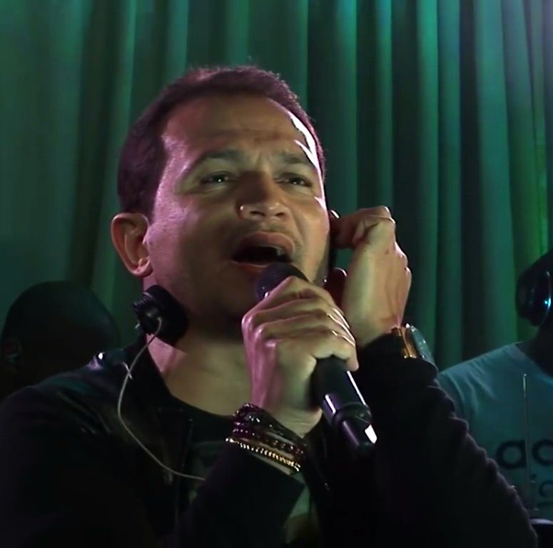 Davi Sacer, em apresentação na Rádio Melodia.